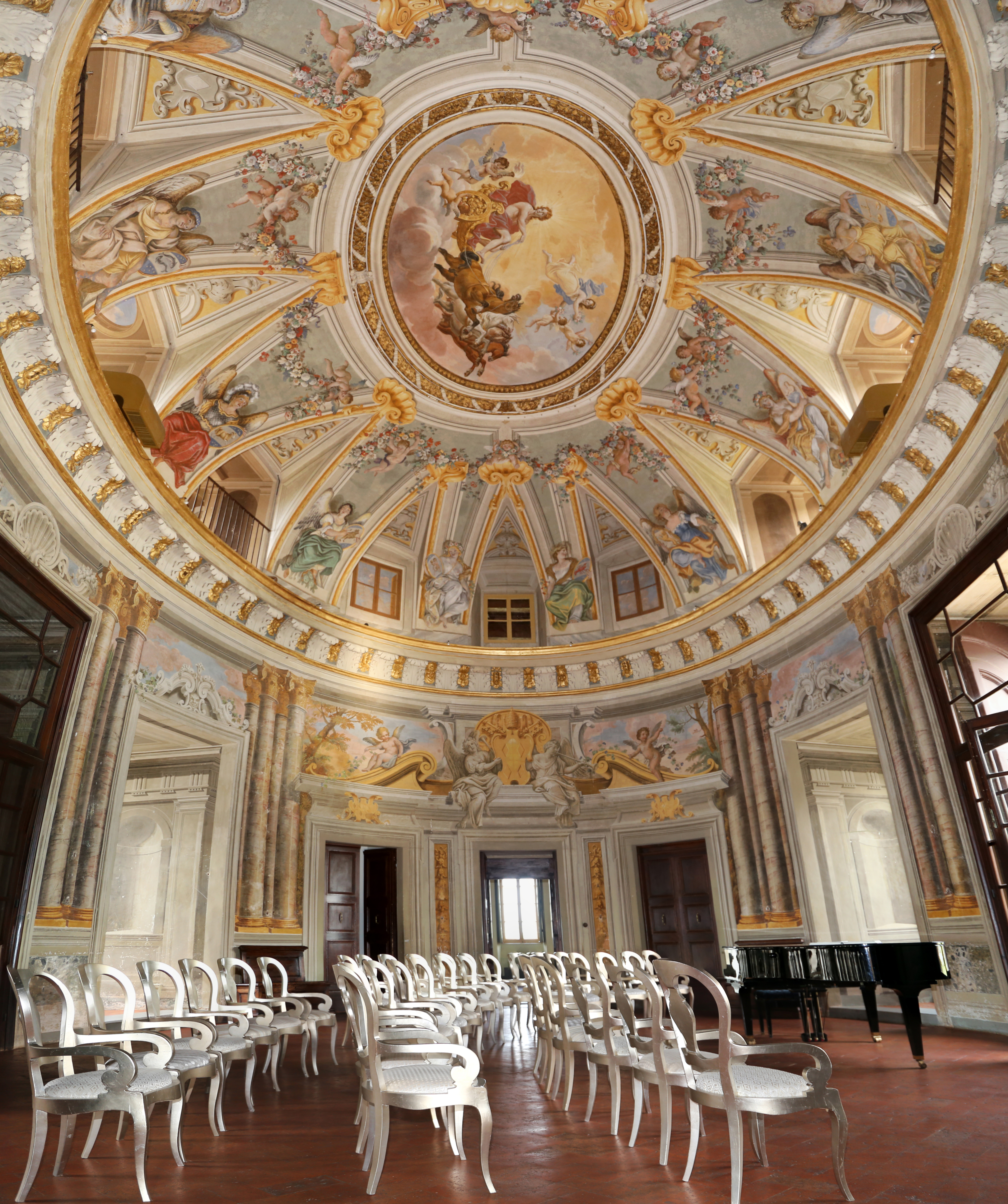 Villa Rospigliosi This is a photo of a monument which is part of cultural heritage of Italy.